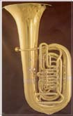 Tuba in B Bildquelle Firma: Rudolf Meinl. Inhaber hat GNU-FDL zugestimmt.